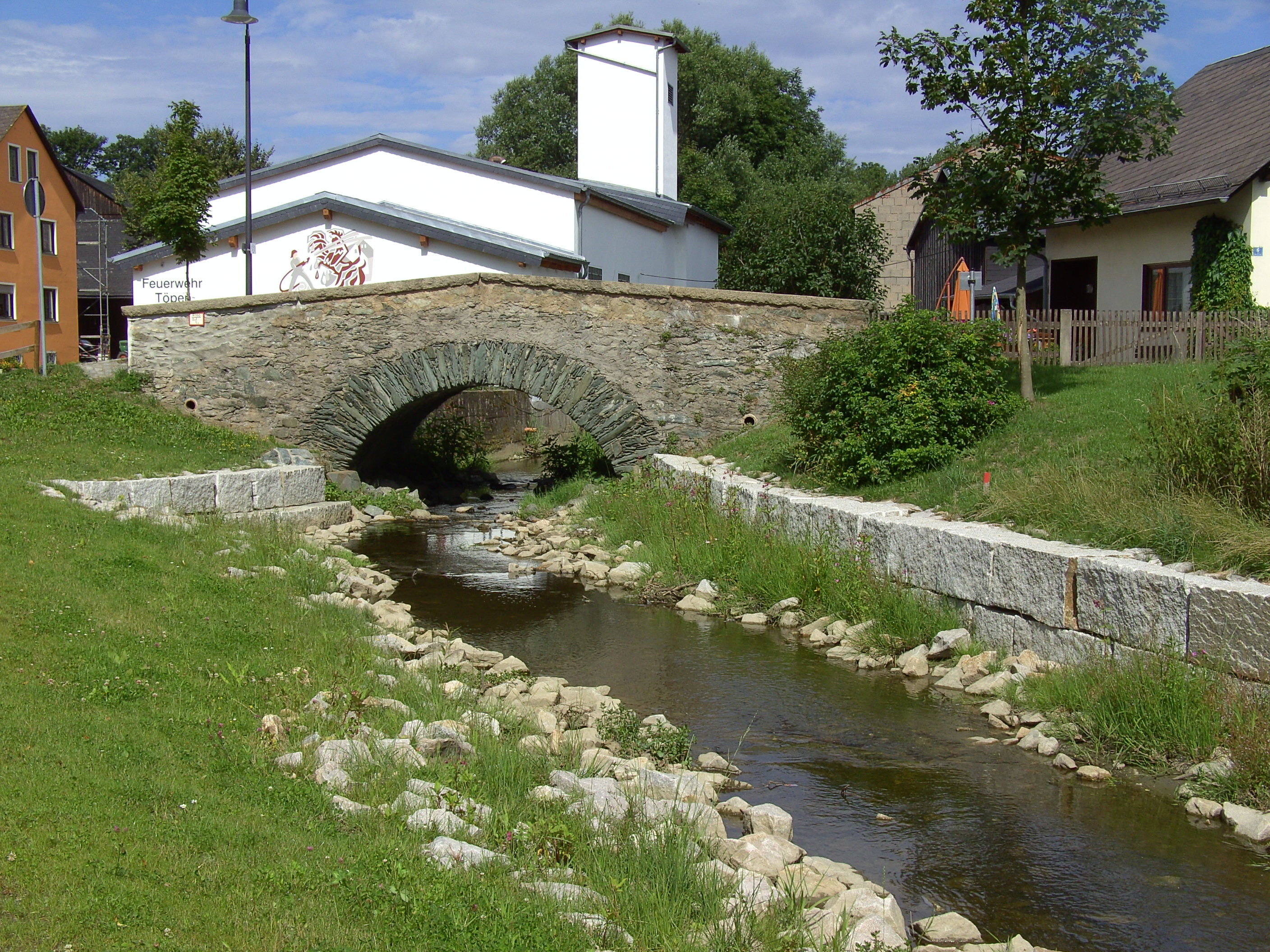 Der Kupferbach in Töpen